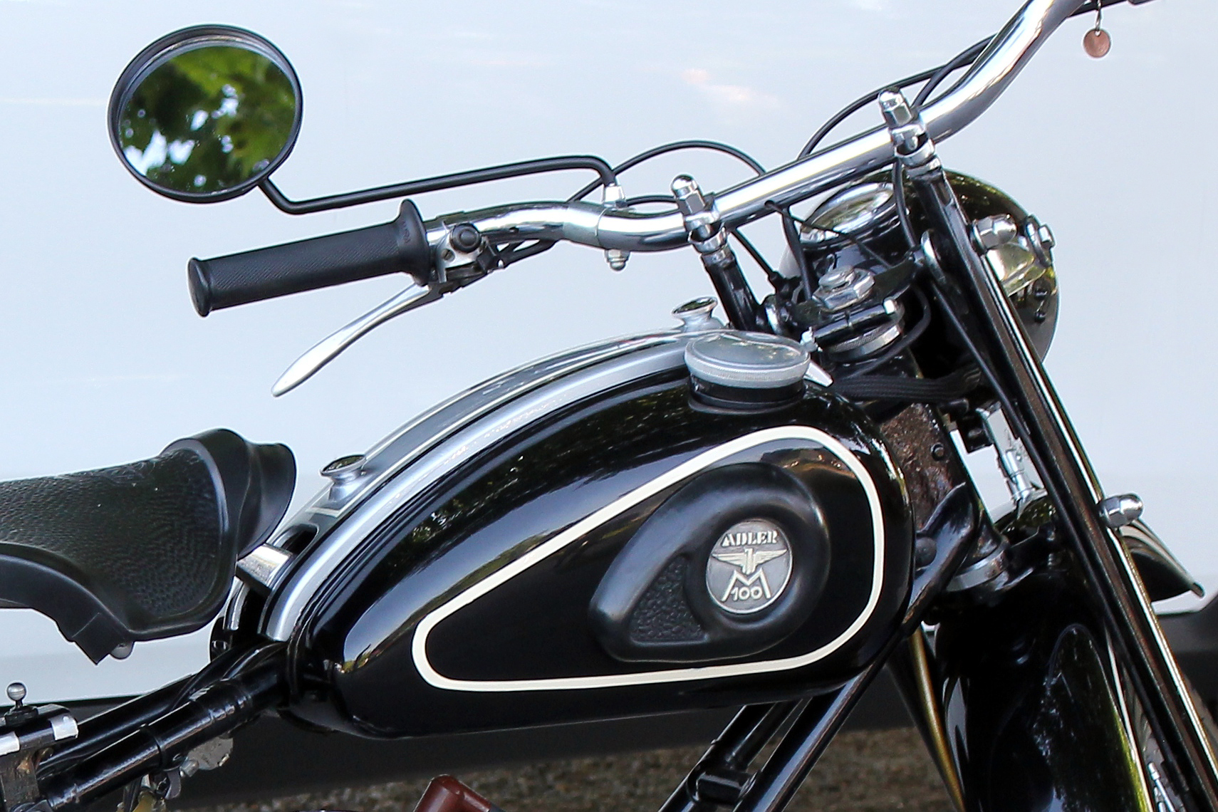 Tank mit Werkzeugkasten in der Mitte: Adler M 100, Zweitaktmotor, 98,175 cm³, 3,75 PS, Baujahr 1951 (Angaben laut Typenschild))